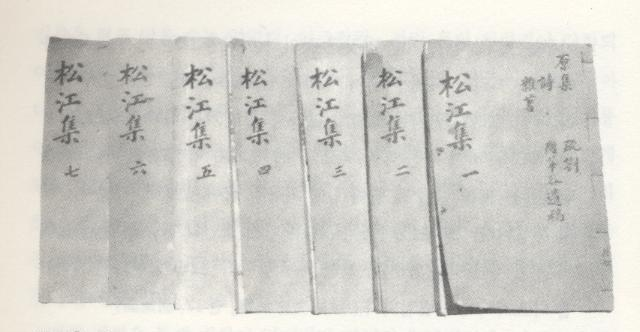 송강 정철의 저서 송강문집